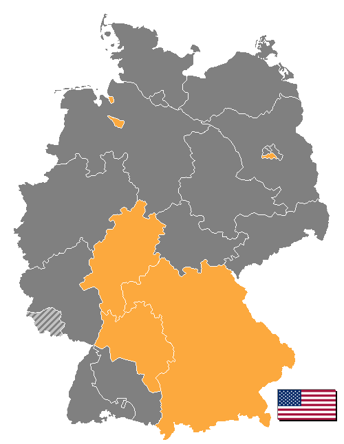 Manche Bundesländer sind erst 1946 gebildet worden. 1946 aber auch das Saarland aus der fr.BZ rausgenommen. Bild selbst erstellt.